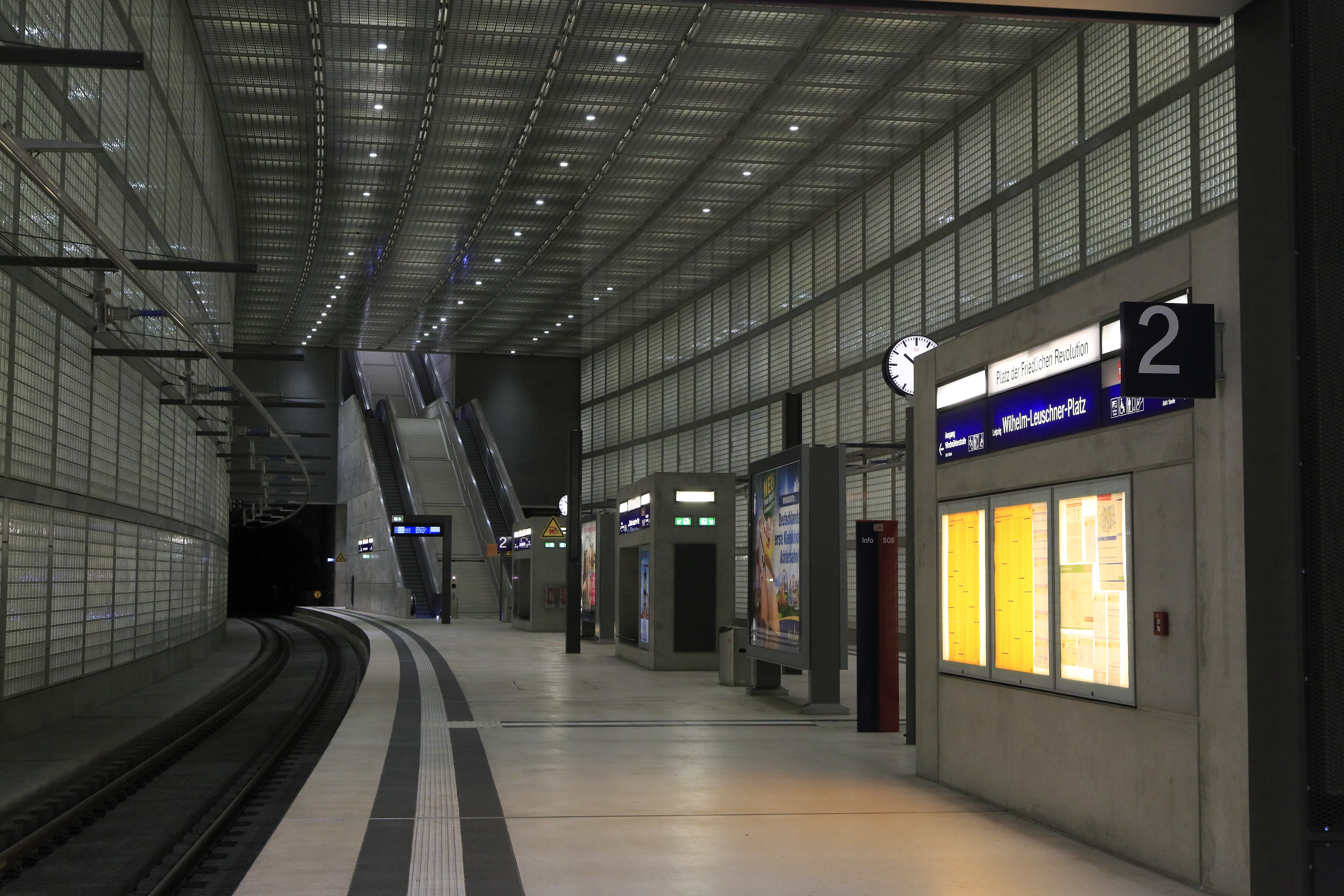 Auch dieser Tunnelbahnsteig liegt im Bogen, Richtung Le Bayer Bf.